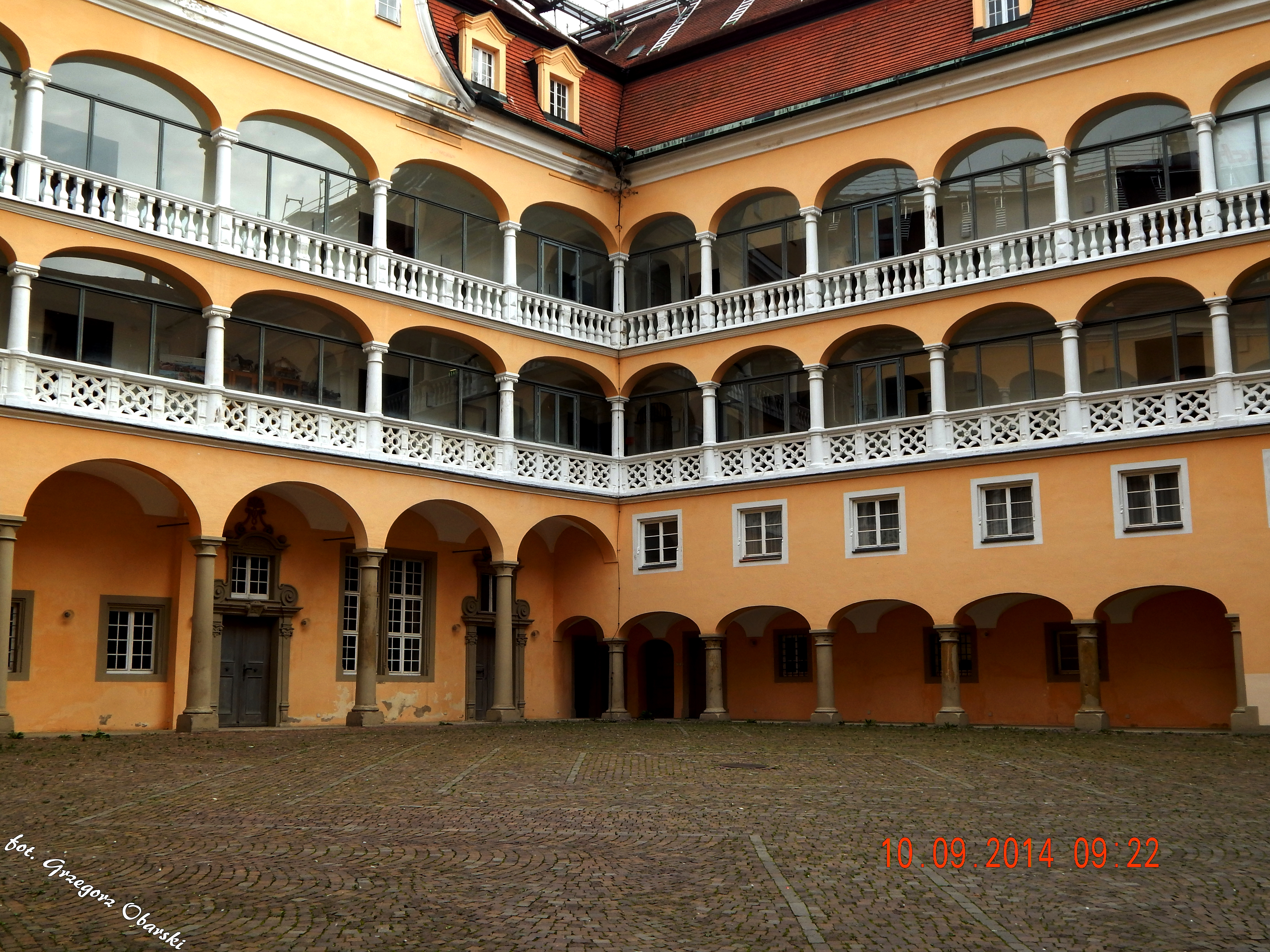 Zdjęcie zamku w Ellwangen.